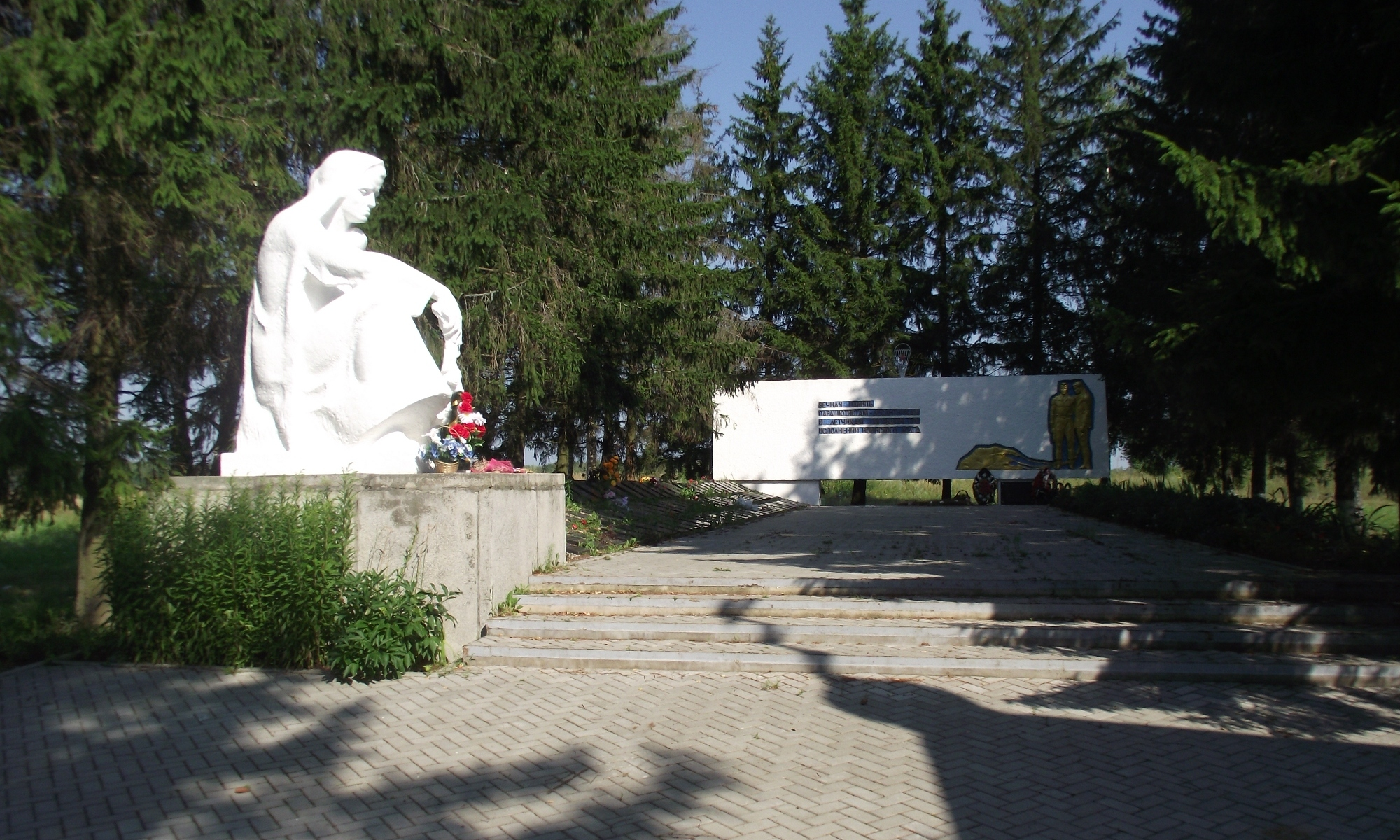 Памятник на месте катастрофы самолёта Ан-12 после столкновения с Ил-14